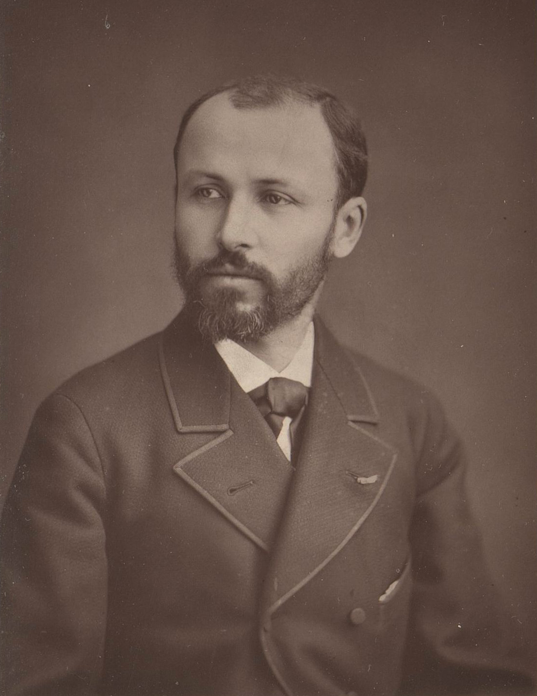 Portrait du sculpteur Jean Gautherin (1840-1890), photographié par Ferdinand Mulnier, photoglyptie, édition Goupil & Cie. Amsterdam, Rijksmuseum.